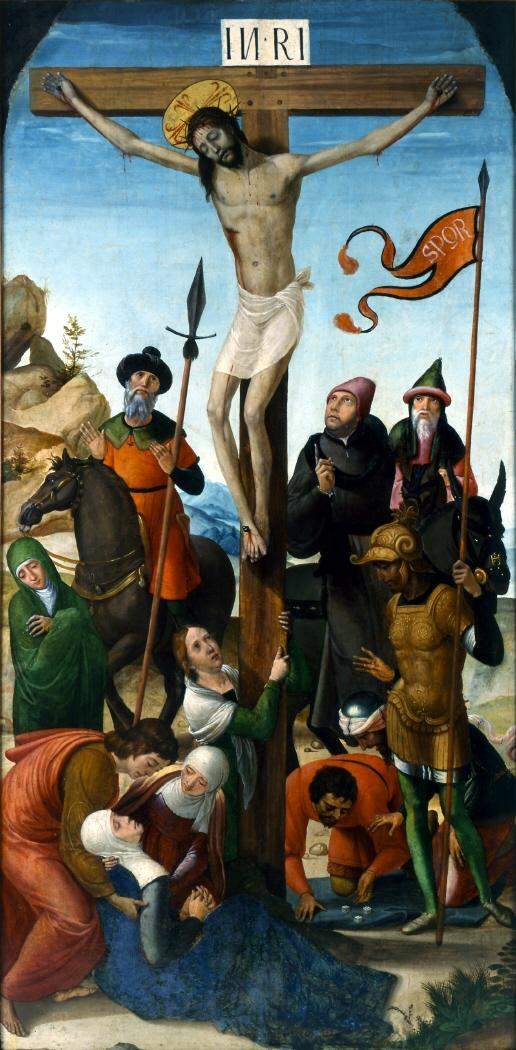 La obra representa a Jesucristo crucificado en el monte Gólgota.